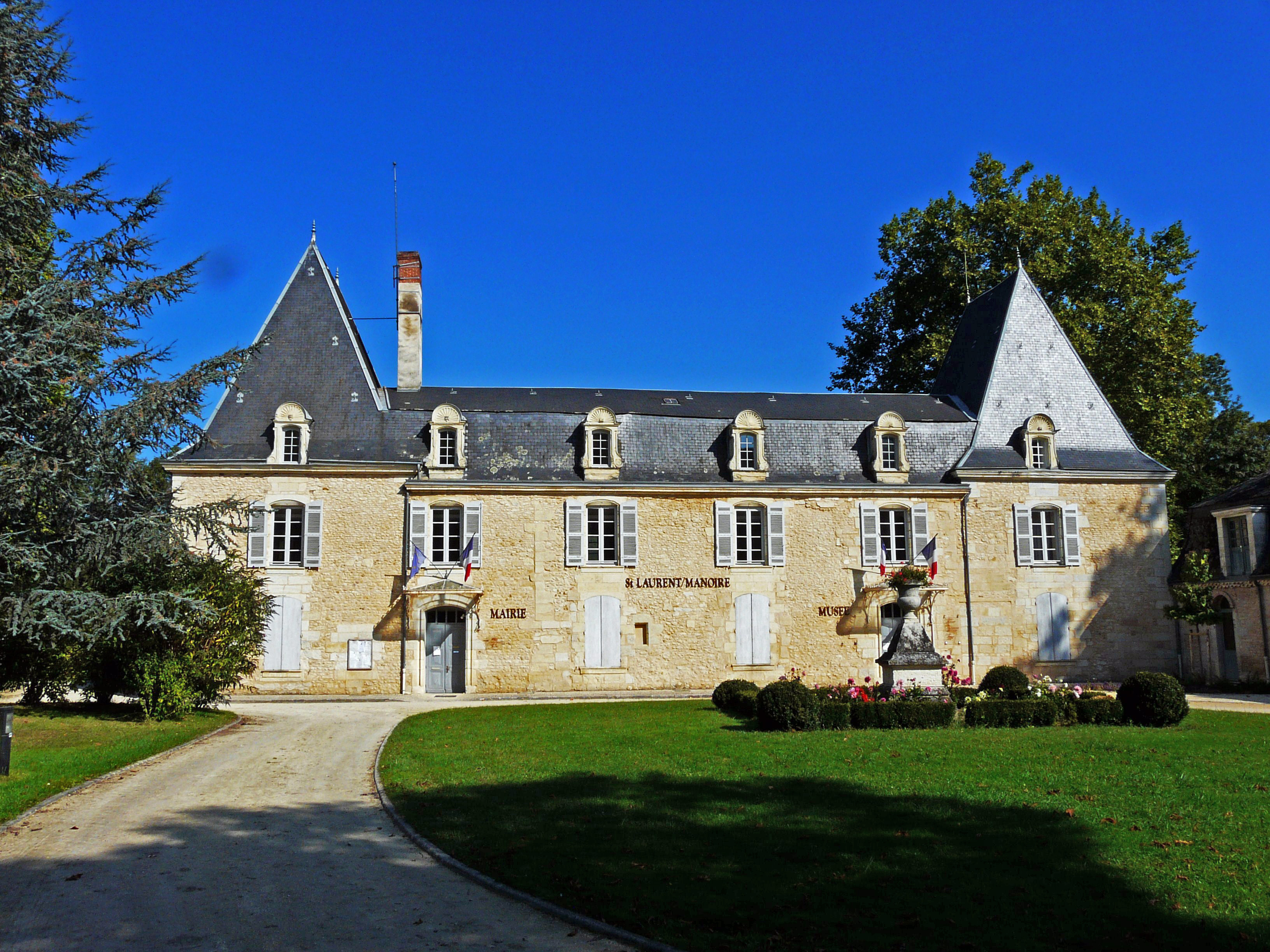 Mairie de Saint-Laurent-sur-Manoire, Dordogne, France